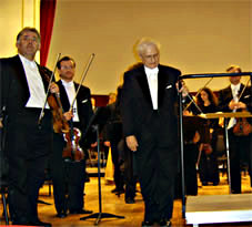 Ervin Acél după unul din ultimele concerte înainte de moarte